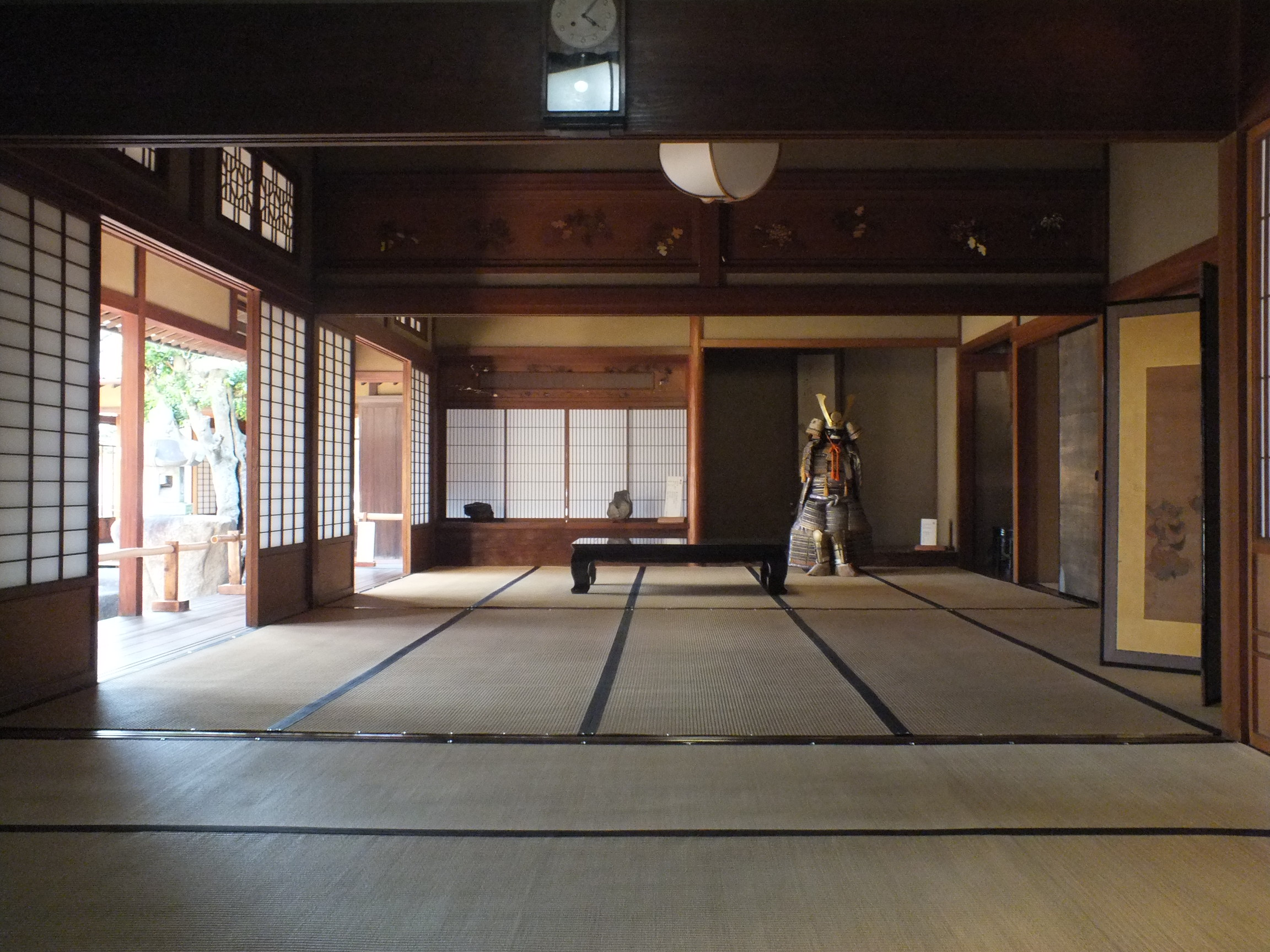 Old Kishi-House Nishiwaki,Hyogo,Japan 旧来住家住宅（来住梅吉旧邸）